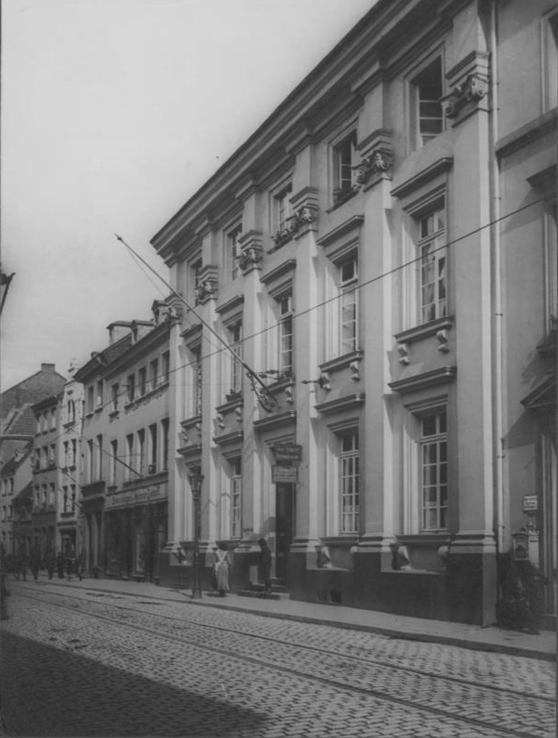 Düsseldorf, Ratingerstr. 15, Einzelbilder vom Niederrhein (1056), Erwin Quedenfeldt, 1909